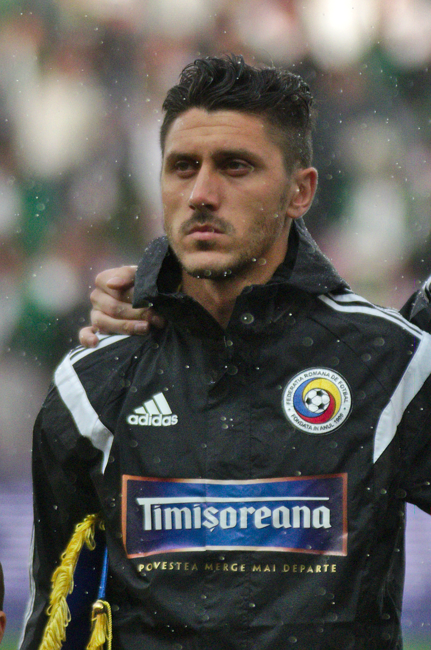 Algérie-Roumanie - 20140604 - Ciprian Marica